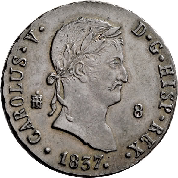 Moneda de 8 maravedíes acuñada en Segovia a nombre de Carlos V de España, Carlos María Isidro de Borbón. El dia 3 de agosto de 1837, las tropas carlistas de Zaratiegui, con 4.300 hombres y 310 caballos entraron por las puertas de la muralla de la ciudad de Segovia. La casa de la moneda cayó primero, pues los asaltantes tenían gran interés por acuñar moneda a nombre de su Rey. Durante los diez dias que las tropas ocuparon la ciudad castellana, se acuñaron de 8 a 10 mil reales en moneda de ocho maravedís con troqueles del fallecido Fernando VII, a los cuales el grabador jubilado de la Casa, y a instancias de las fuerzas carlistas, añadió un bigote y la leyenda CAROLUS·V·D[EI]·G[RATIA]·HISP[ANIARUM]·REX. 1837. Carlos V por la Gracia de Dios rey de las Españas, 1837